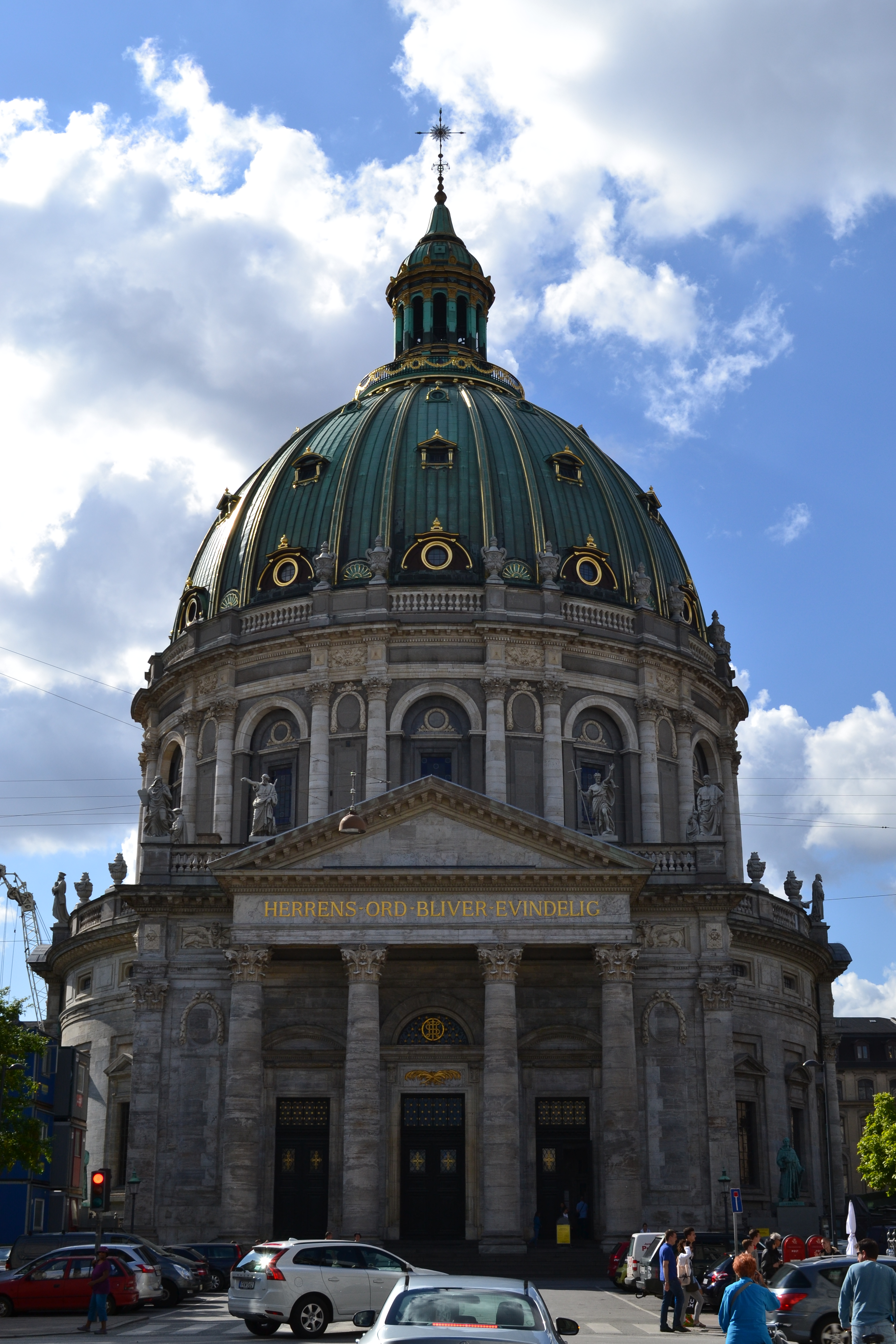 Frederikskirche bei Tag